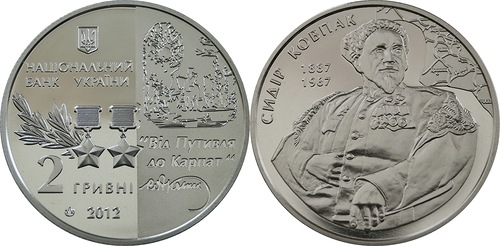 Украинская монета номиналом 2 гривны с изображением Сидора Ковпака